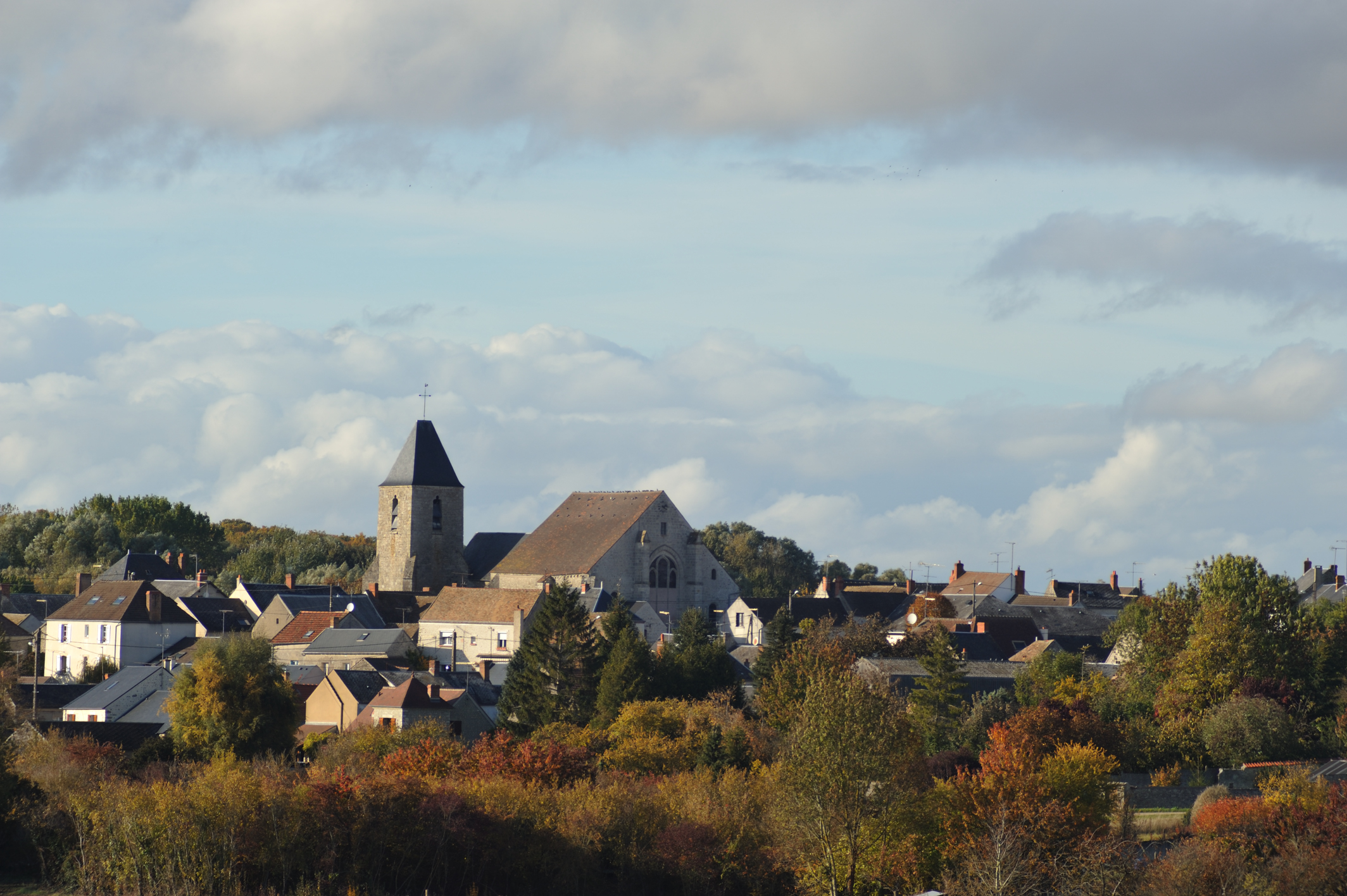 Vue générale du centre d'Autruy-sur-Juine, Loiret, France